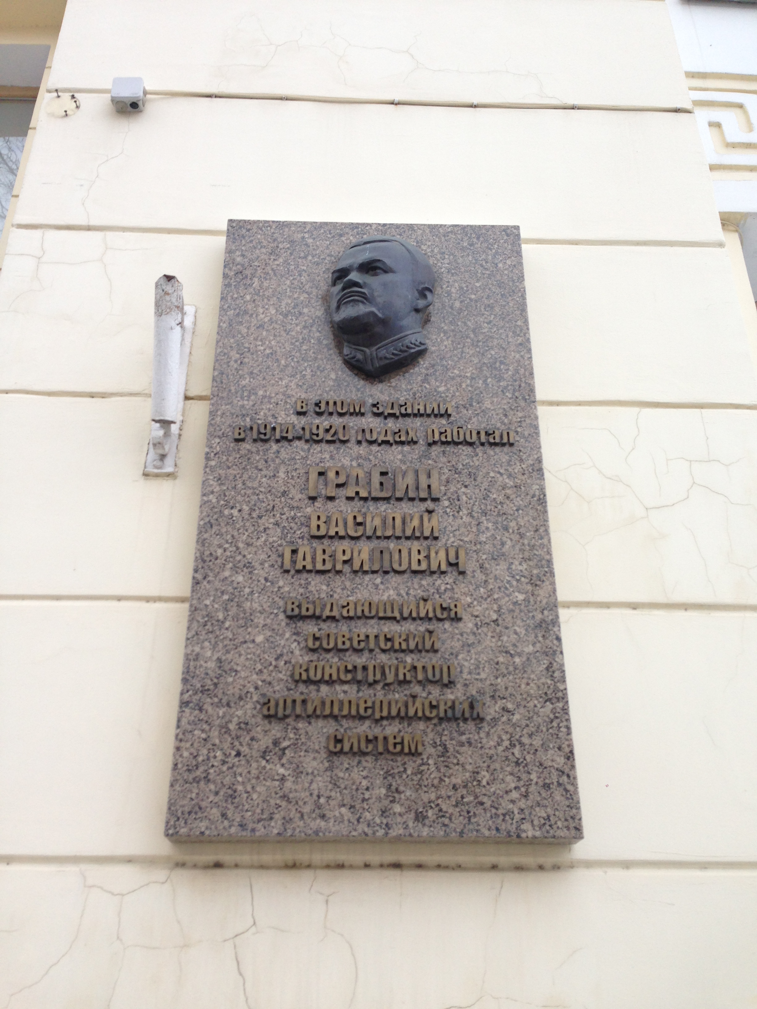 Мемориальная доска в Краснодаре на здании "Почта России"